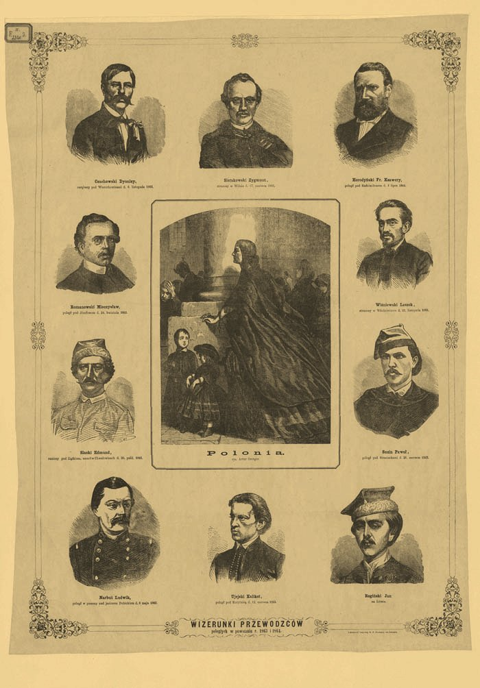 Wizerunki przywódców poległych w powstaniu w 1863 i 1864 r. W.T i J. M., po 1867 drzeworyt, 565 x 415 mm Kolekcja Rapperswilska